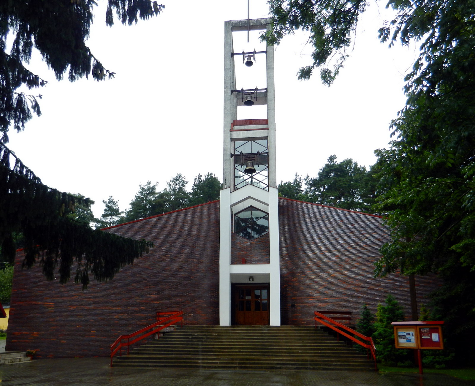 Kościół p.w. Matki Bożej Królowej Polski w Choczewie.